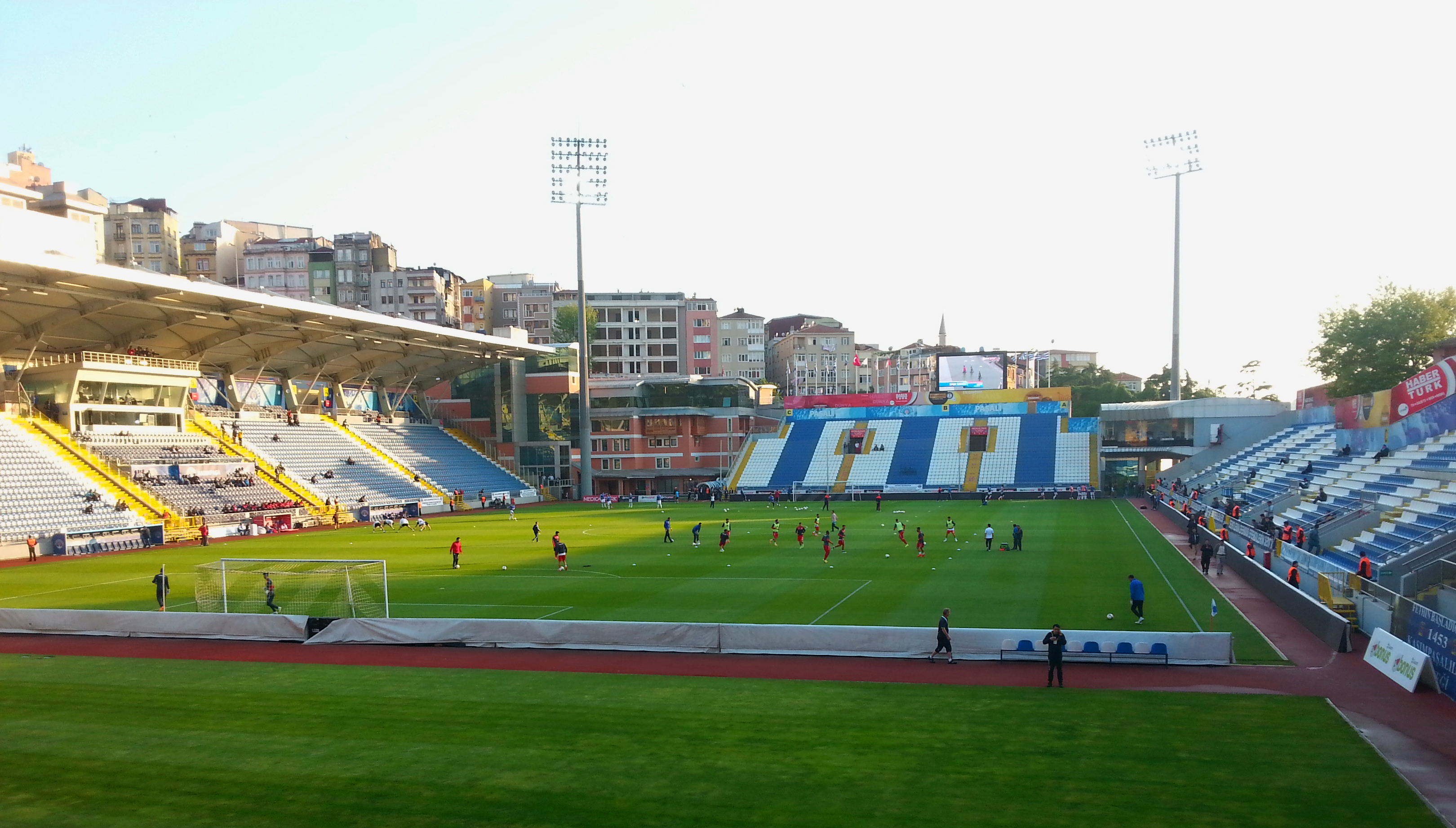 Kasımpaşa Stadyumu, 2015 yılında.